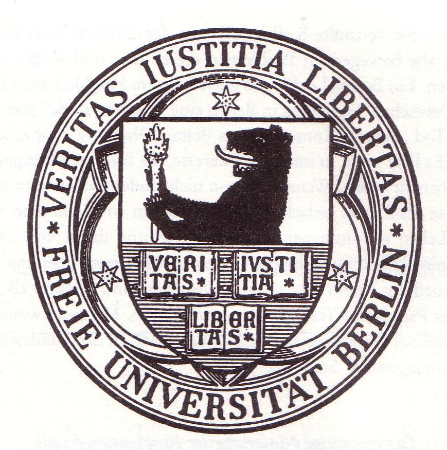 Wappenschild der Freien Universität Berlin, am 13. Mai 1968 vor dem Rektorat verbrannt